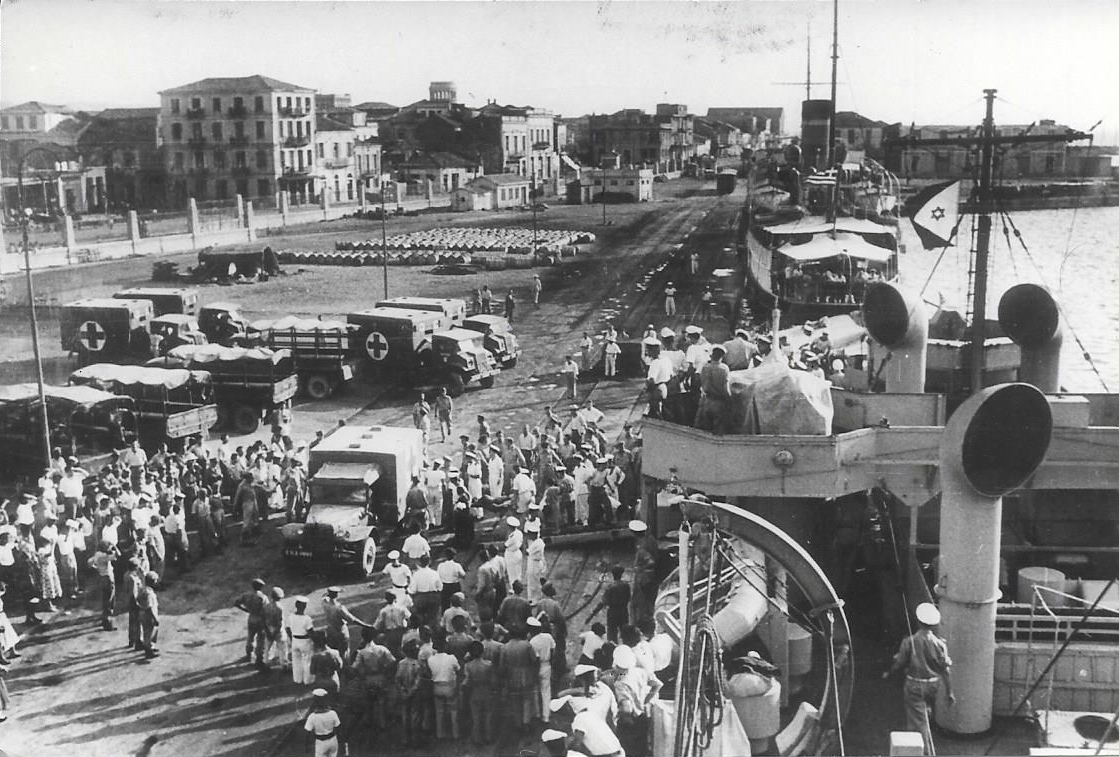 הפריגטות אח"י מבטח (ק-28) ואח"י מזנק (ק-32) פורקות פצועים בנמל פטרס.